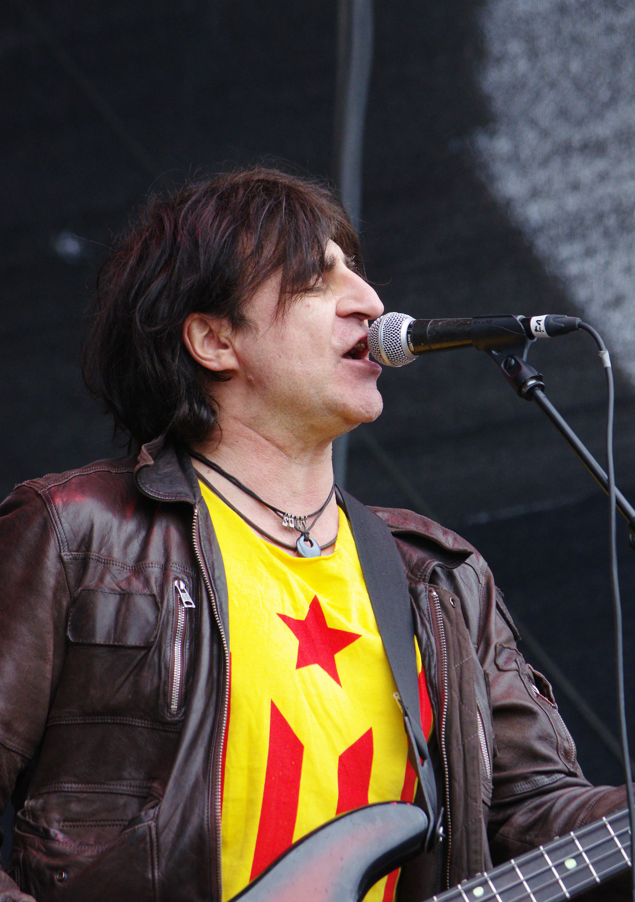 Chameleons Vox, Rock in den Ruinen 2013 in Dortmund. Mark Burgess (voc, bass)